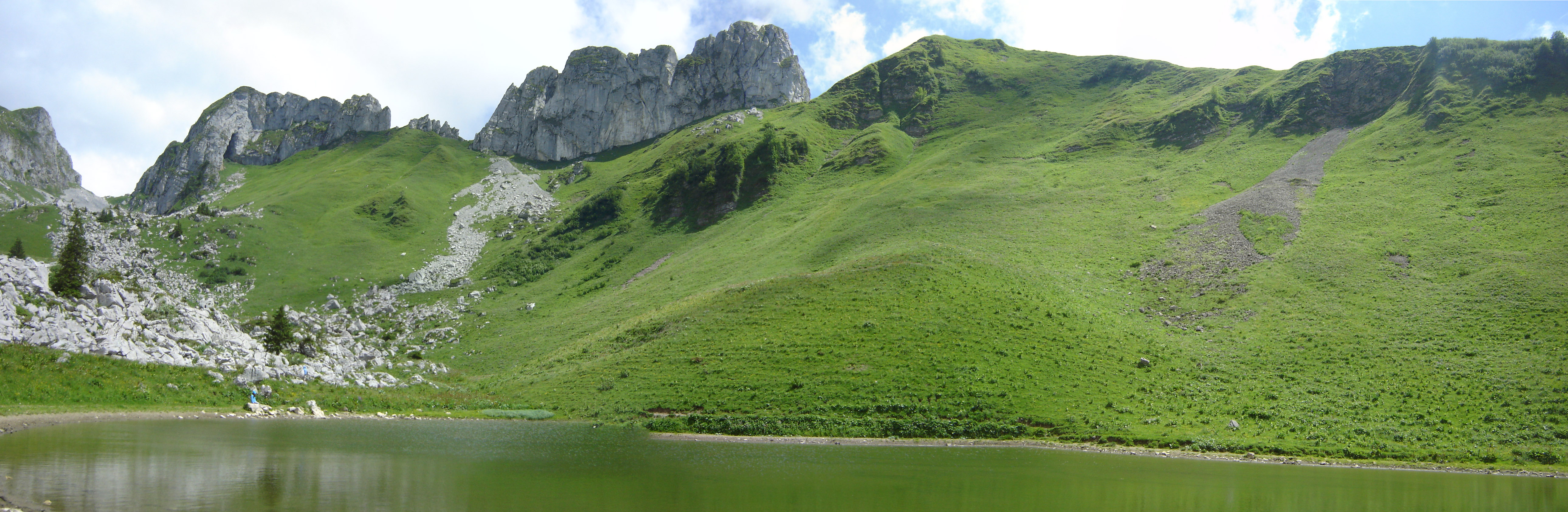 Panorama sur le Lac de la Case au pied de la Dent d'Oche à Bernex, Haute-Savoie.